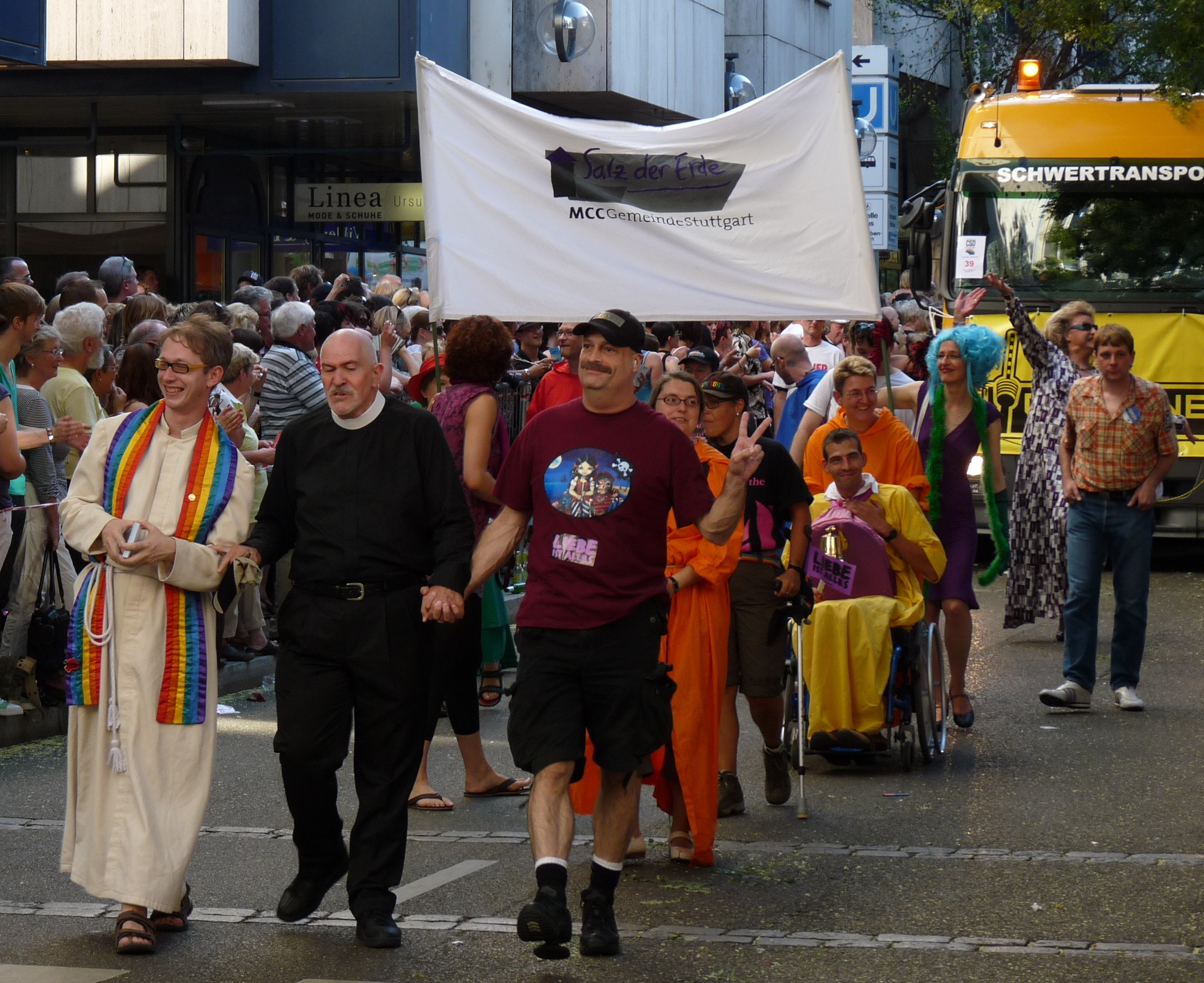 Stuttgart_-_CSD_2009_-_Parade - Salz der Erde